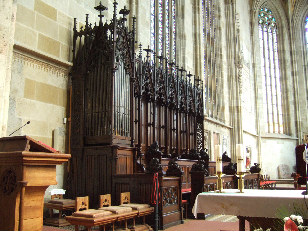 Gotisches Chrogestühl im Chor des Martinsdomes, Bratislava